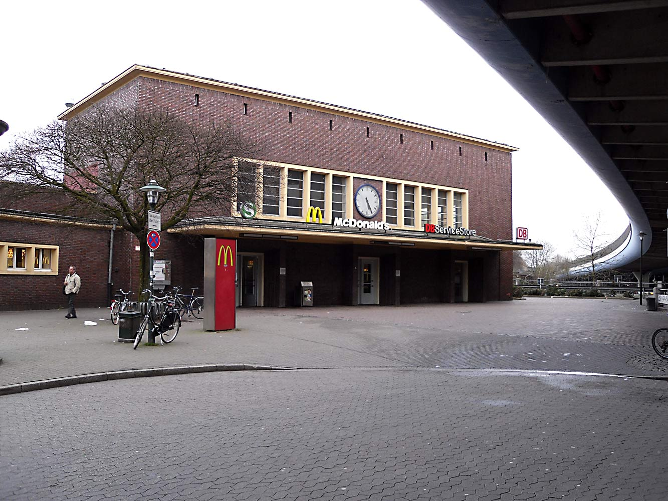 Station Benrath (Düsseldorf)